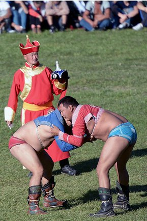 Празднование 100-летия единения Тывы и России. Соревнования по тувинской национальной борьбе хуреш